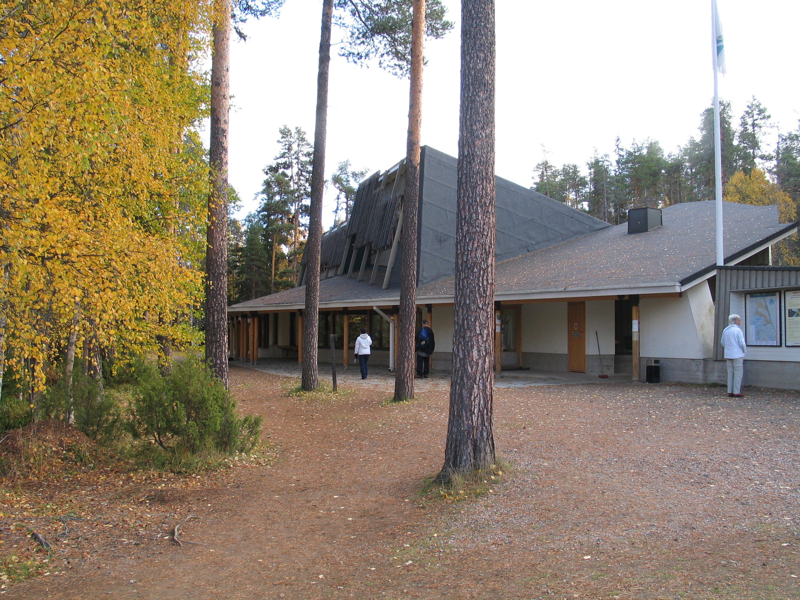 Oulangan luontokeskus sijaitsee Oulangan kansallispuiston keskellä